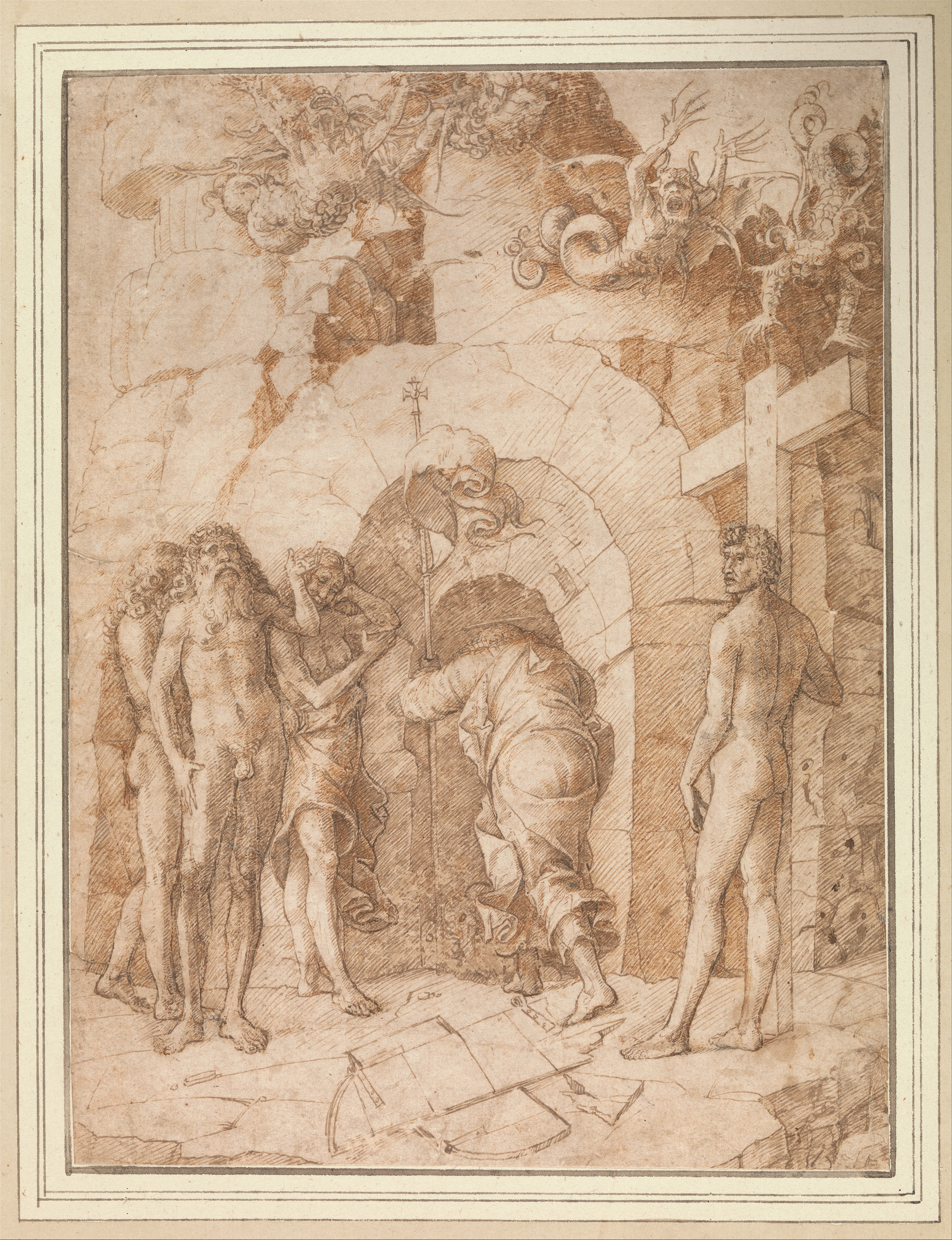 Drawing; Drawings